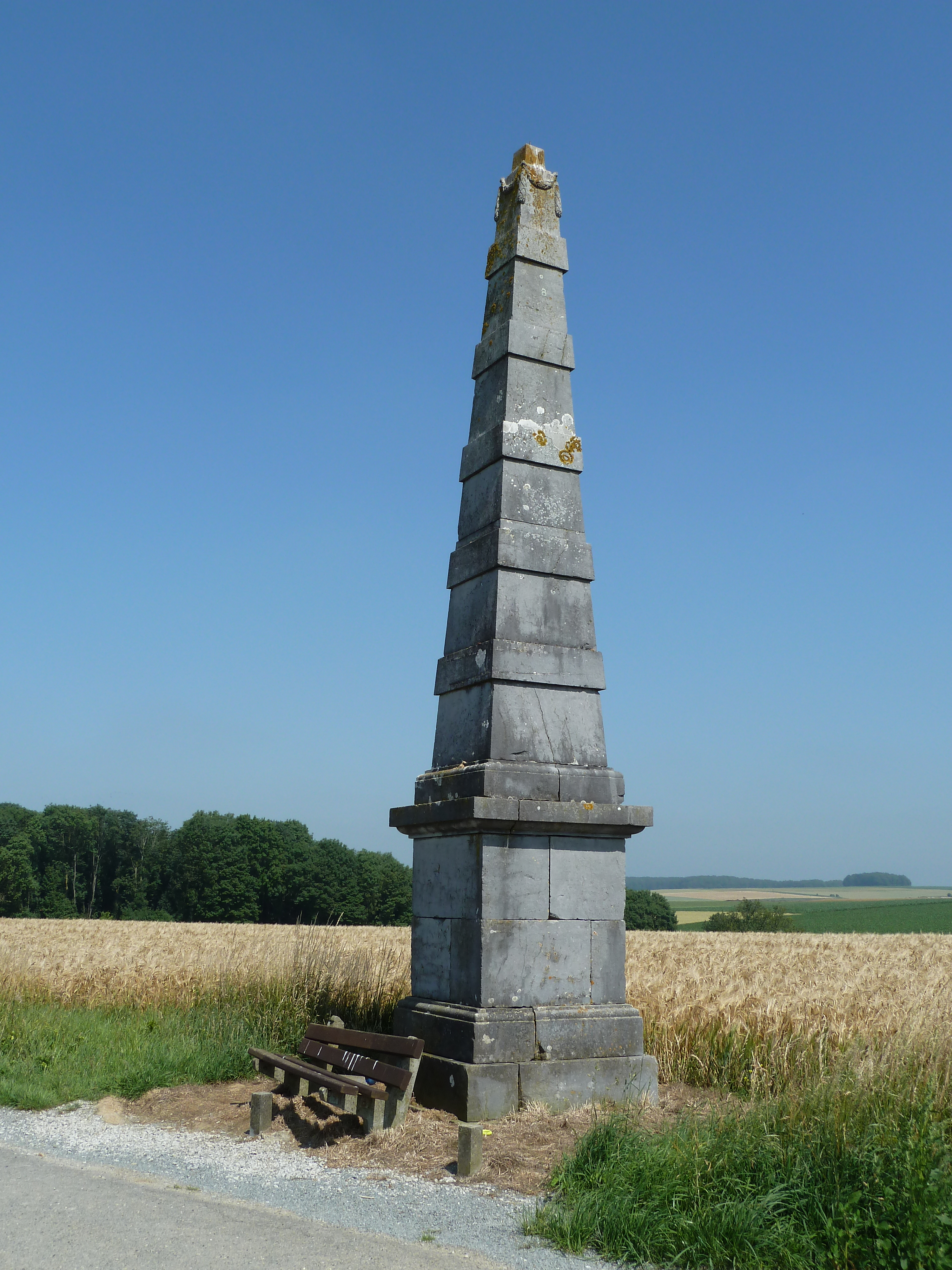 Pyramide de Verlée, Havelange, Belgique